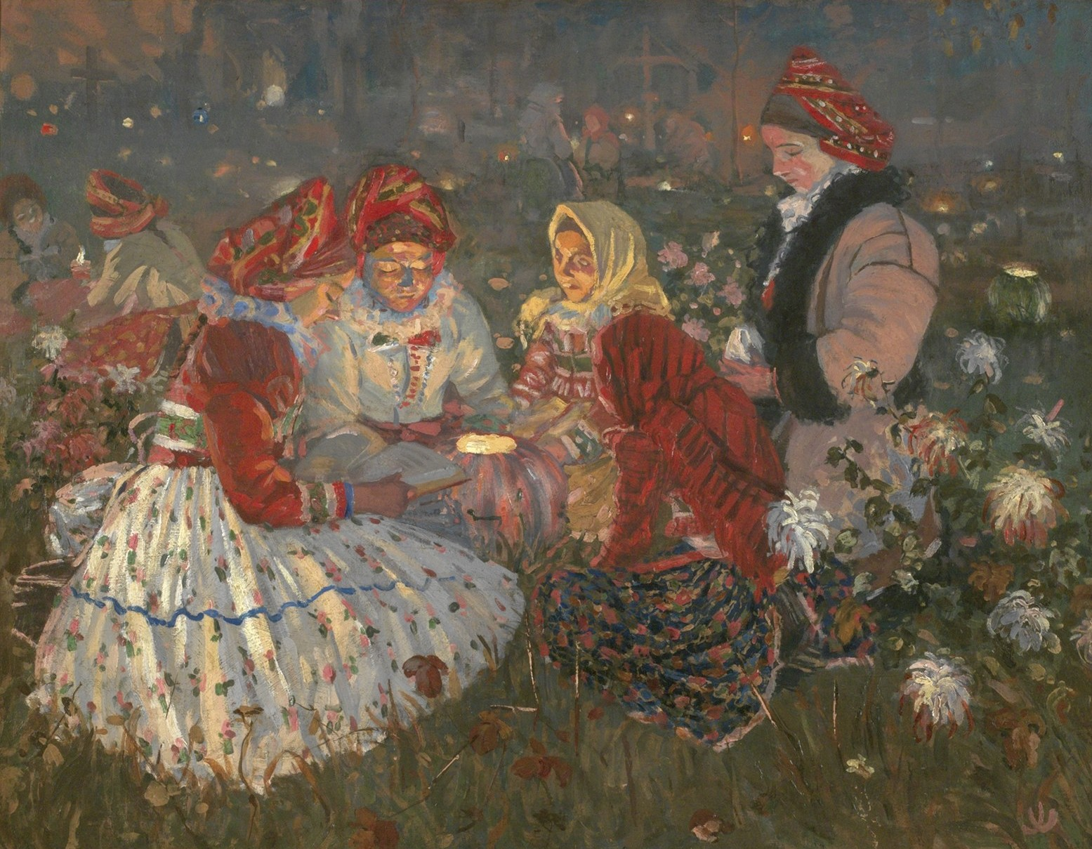 Joža Uprka – Dušičky